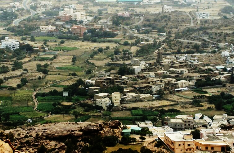 بلاد قبيلة حوالة